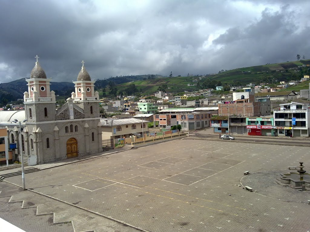 Quisapincha, el 19 de Mayo de 1861 fue nombrada Parroquia de Ambato. Quisapincha es la parte mas antigua de la provincia de Tungurahua